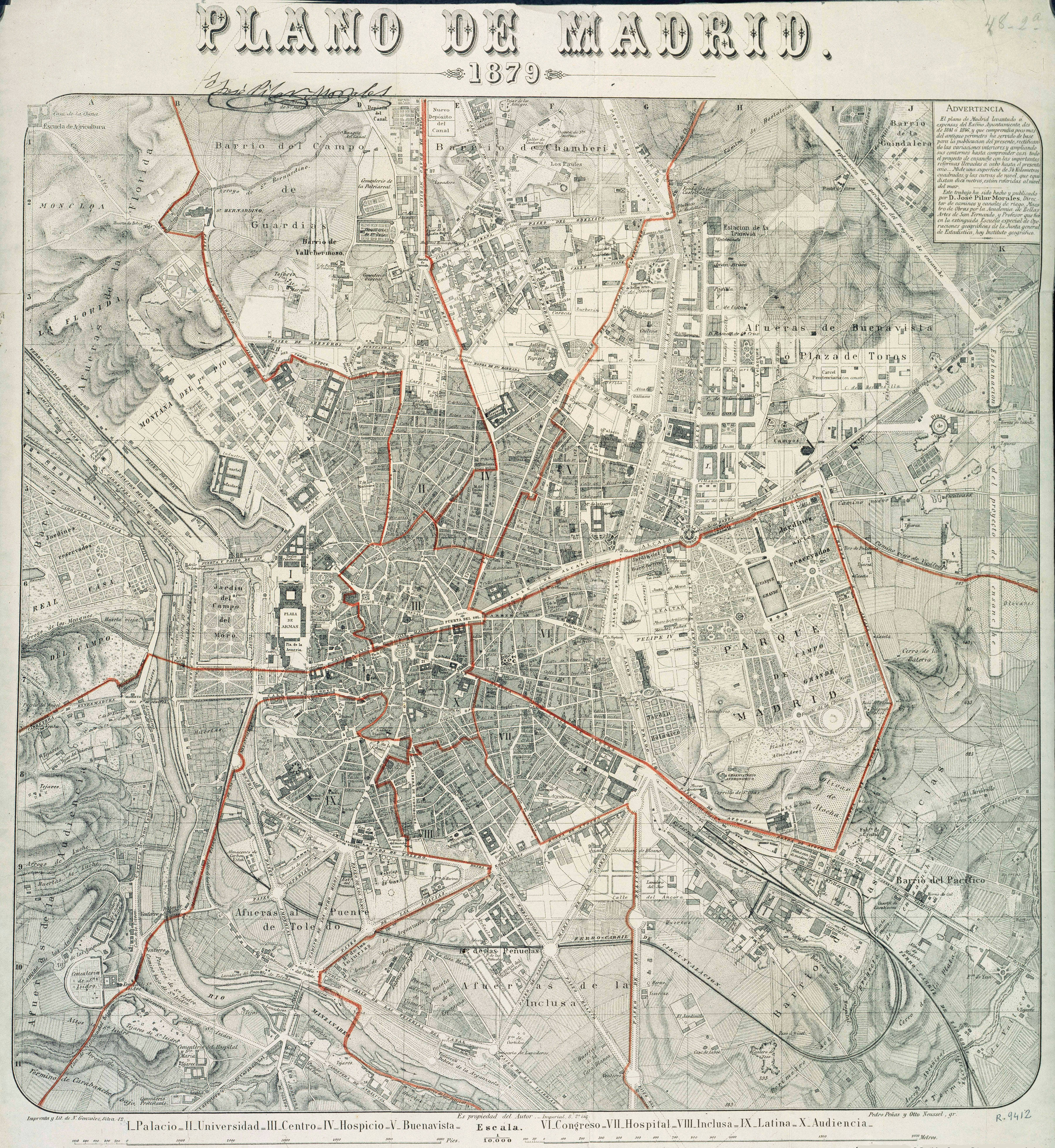 Guia del plano de Madrid y sus contornos en 1877 / por D. José Pilar Morales. - 4ª ed. - Madrid: Tipografia de Gregorio Estrada, 1877